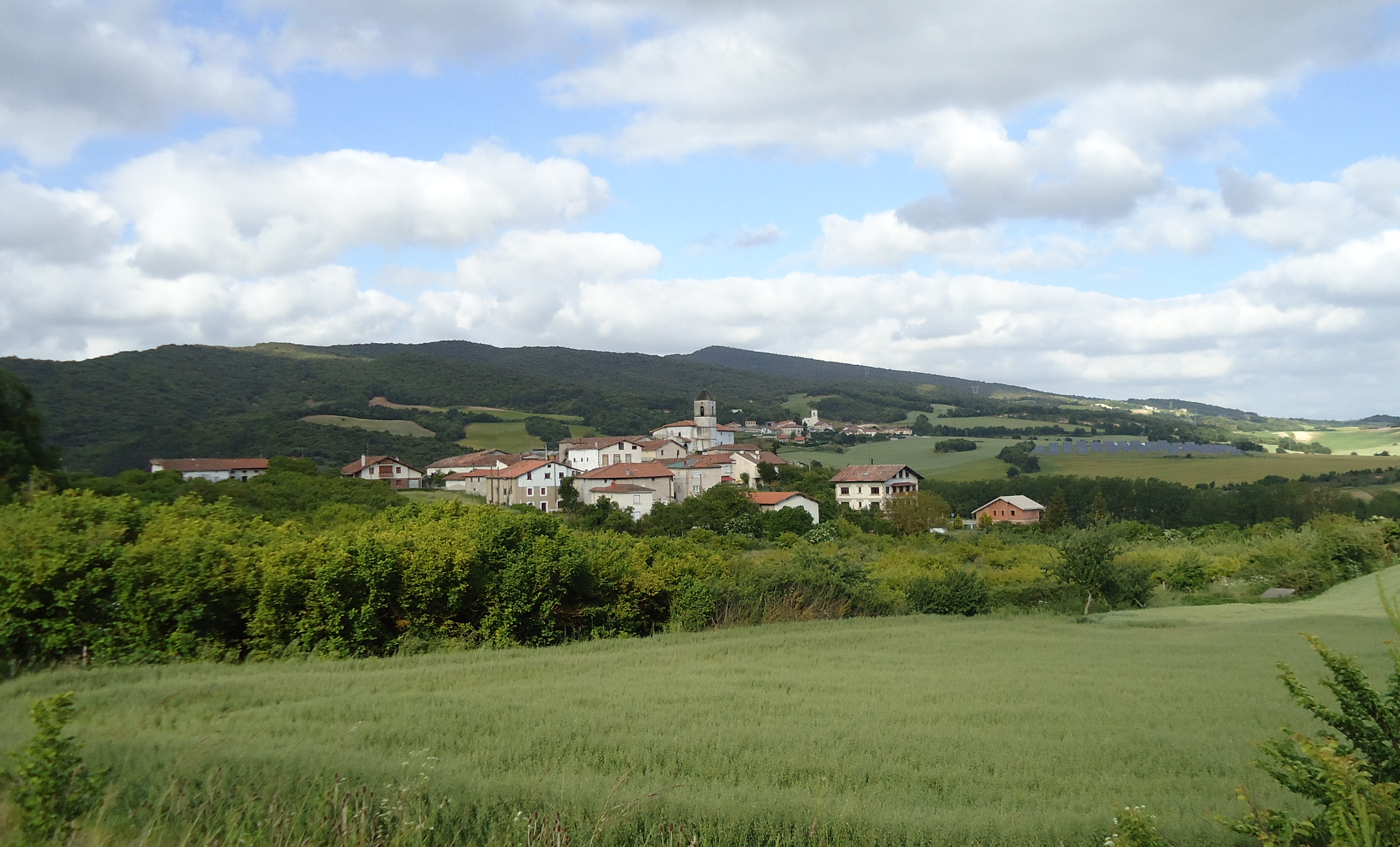 Pobes herria